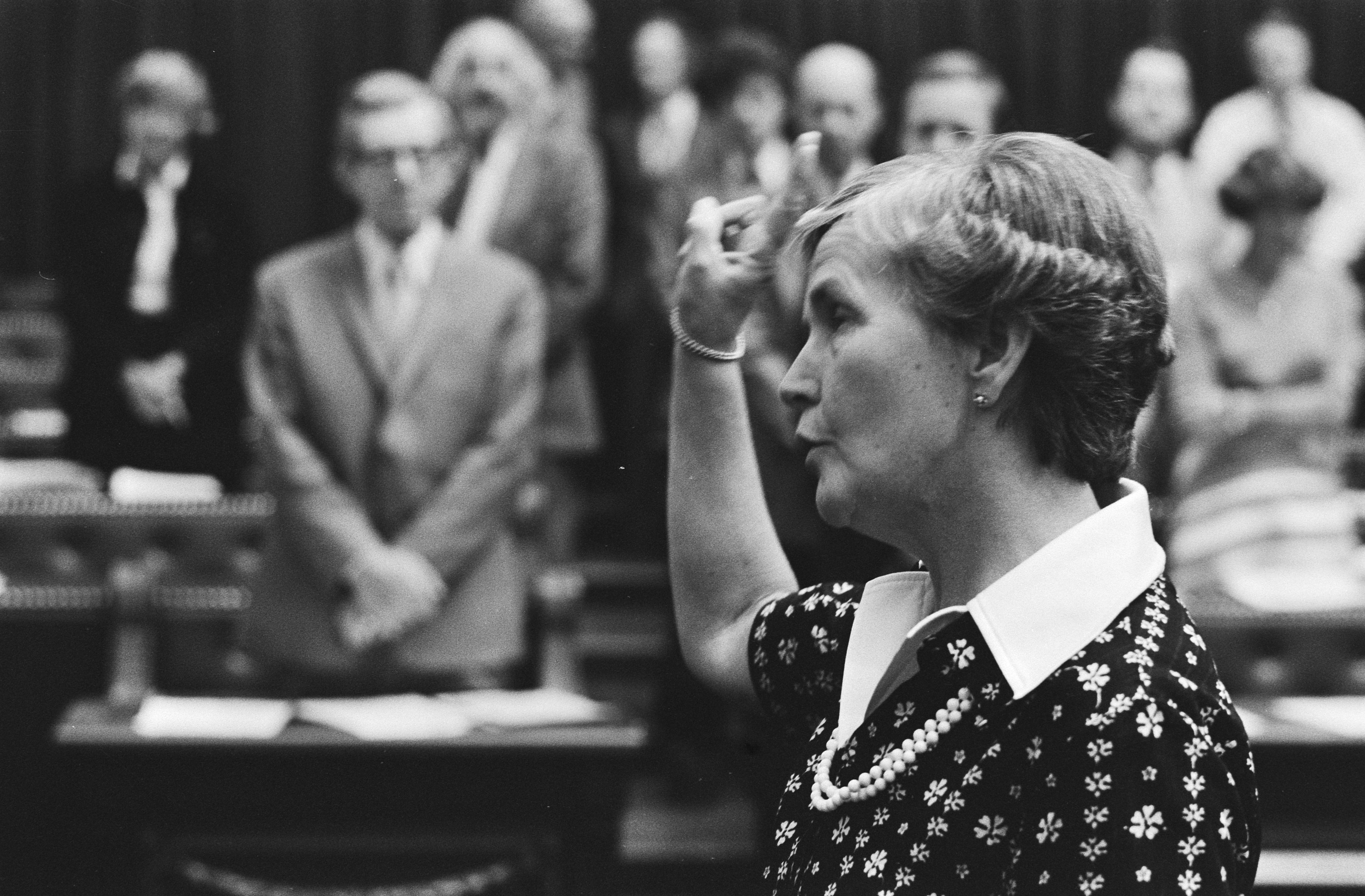 Collectie / Archief : Fotocollectie Anefo Reportage / Serie : Tweede Kamer debat problematiek Molukse minderheid Beschrijving : Mevrouw M. Andela-Baur (CDA) wordt beëdigd als kamerlid Datum : 30 augustus 1978 Locatie : Den Haag, Zuid-Holland Trefwoorden : ambtsaanvaardingen, parlementaire debatten, parlementariërs, portretten Persoonsnaam : Andela-Baur, M.A.H. Instellingsnaam : CDA, Tweede Kamer Fotograaf : Fotograaf Onbekend / Anefo Auteursrechthebbende : Nationaal Archief Materiaalsoort : Negatief (zwart/wit) Nummer archiefinventaris : bekijk toegang 2.24.01.05 Bestanddeelnummer : 929-8785